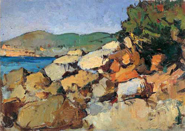 "Sulla spiaggia", olio su tavola